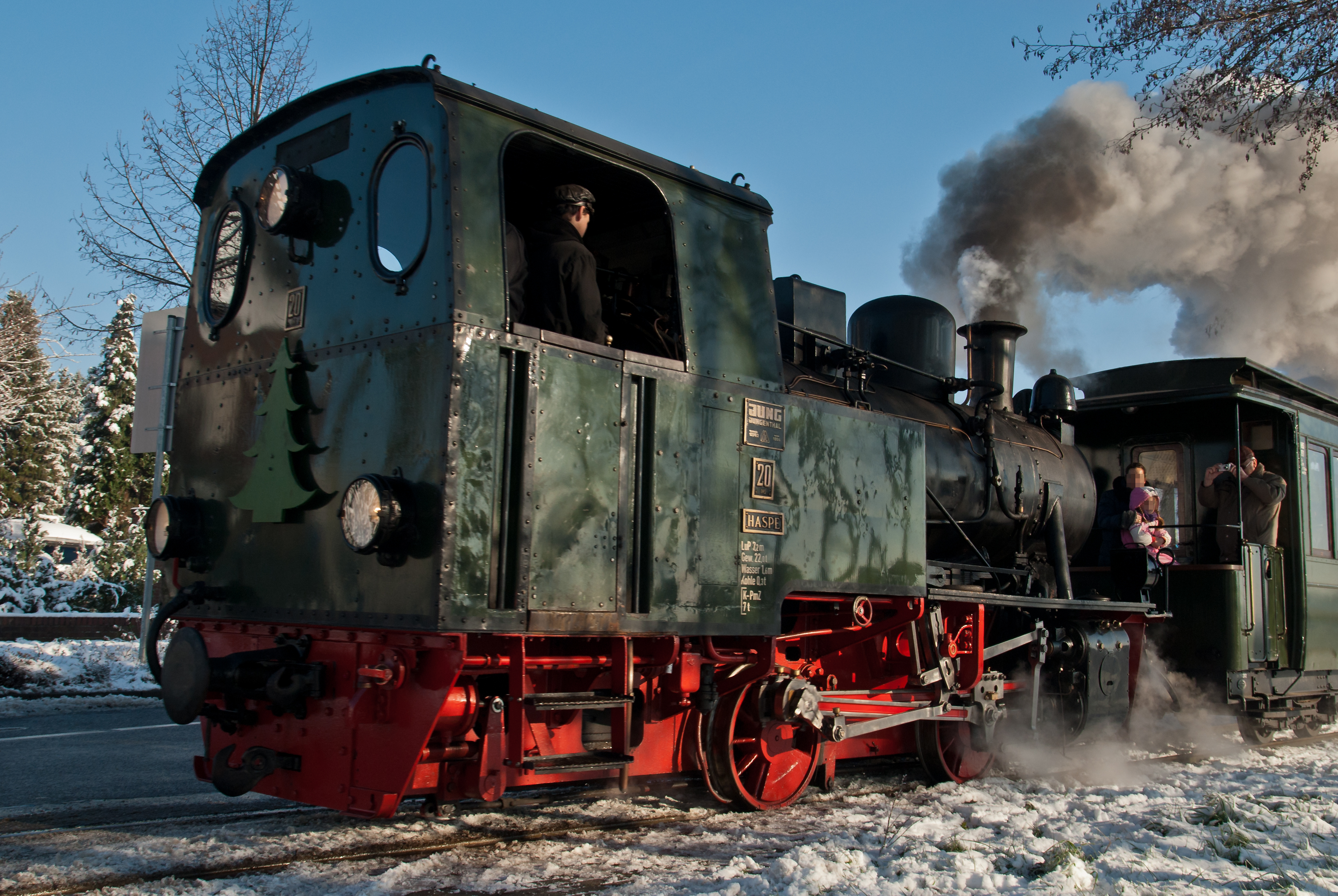 Lok 20 "Haspe" der Interessengemeinschaft Historischer Schienenverkehr auf der Selfkantbahn in Geilenkirchen-Gillrath, Bahnübergang Ziegelei Teuwen